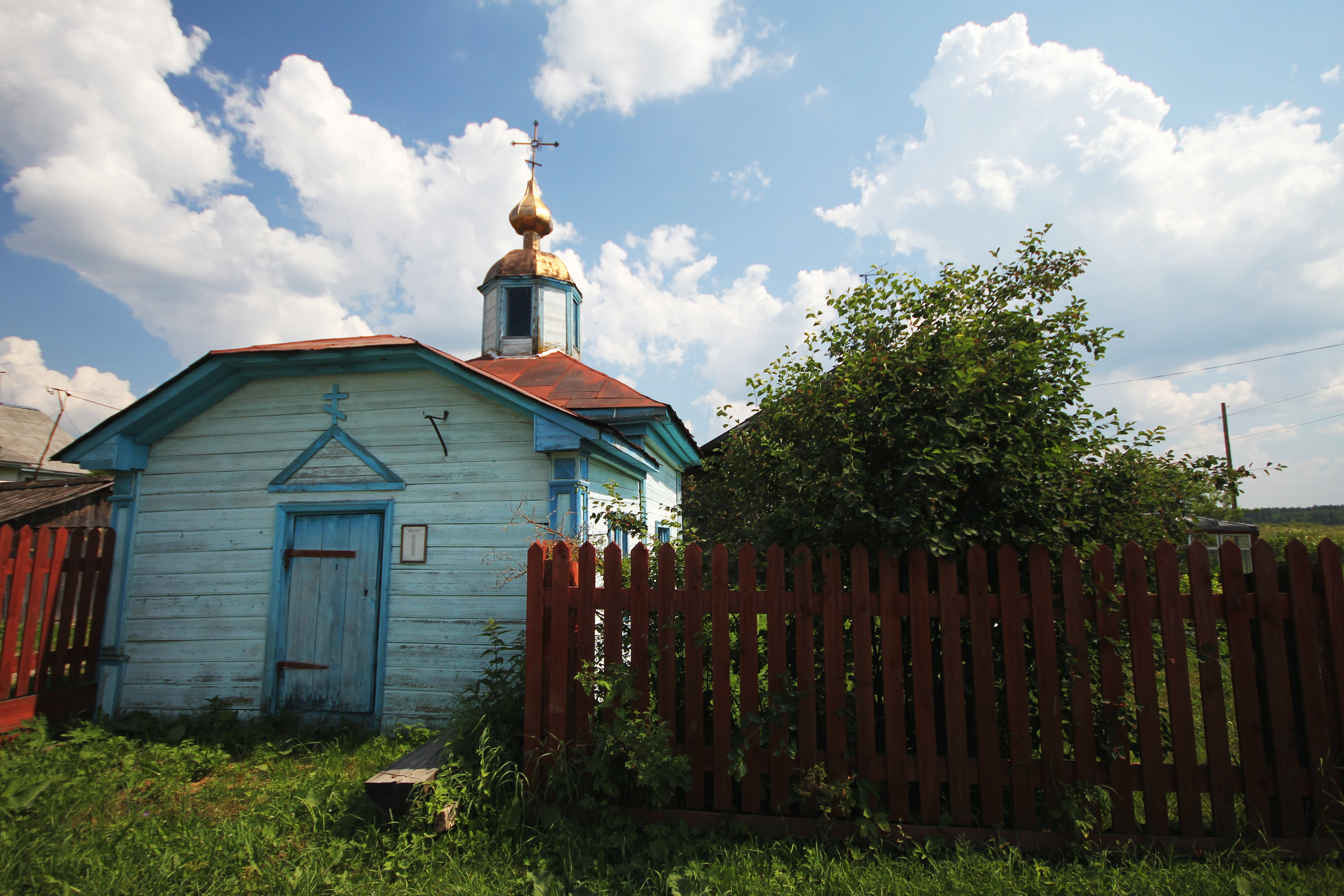 Часовня: Теребино (Низовская с/а), Вельский район, Архангельская область